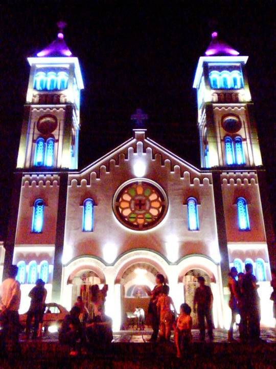 Esta iglesia fue declarada patrimonio departamental del Meta.